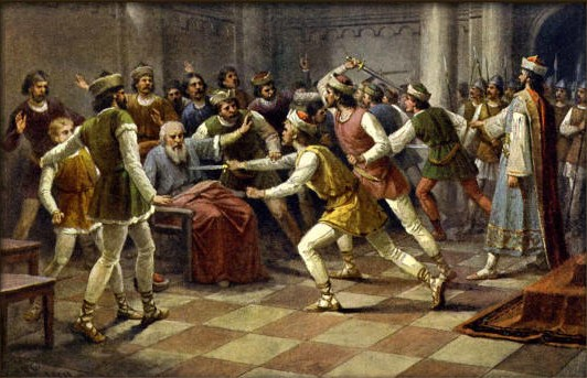 Josef Mathauser - Záhuba Vršovců